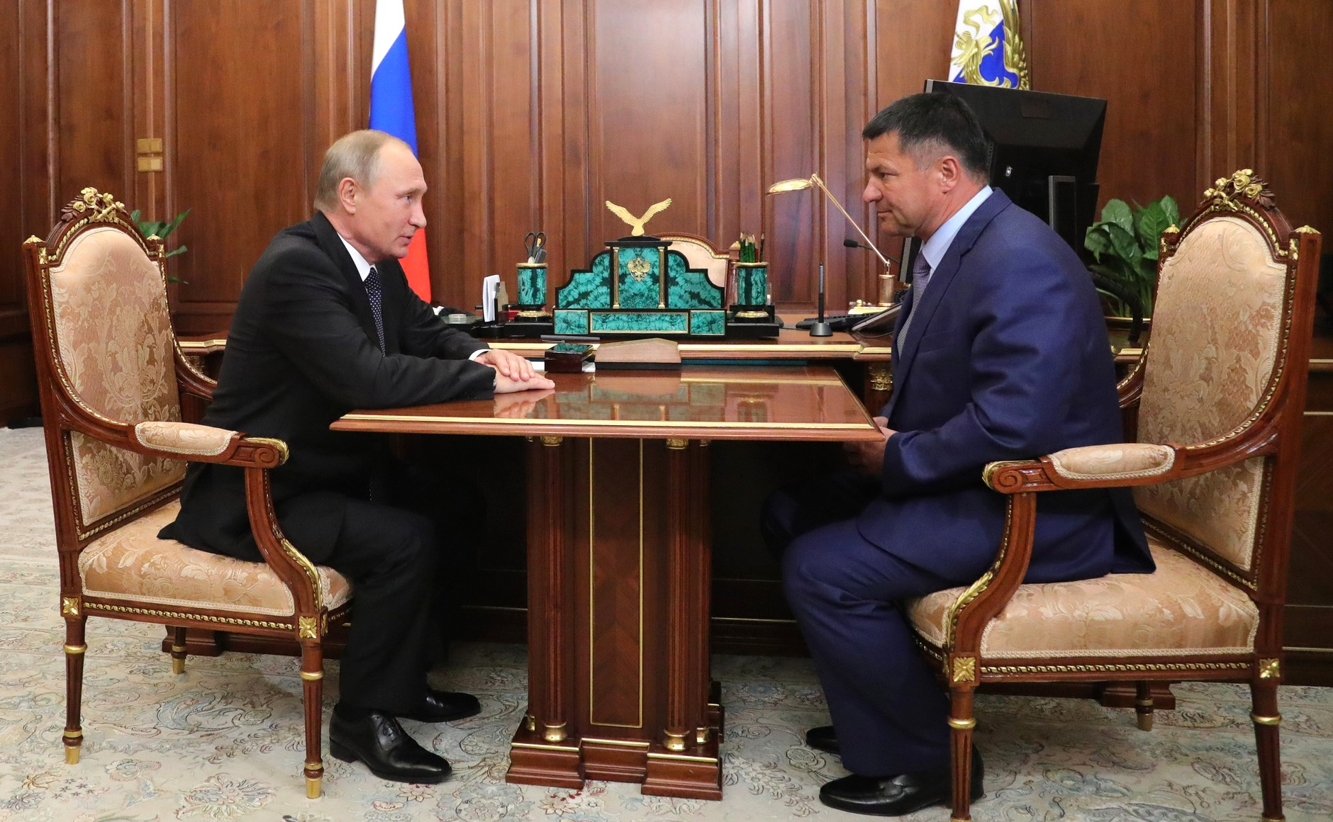 Встреча Президента России Владимира Путина с Андреем Тарасенко